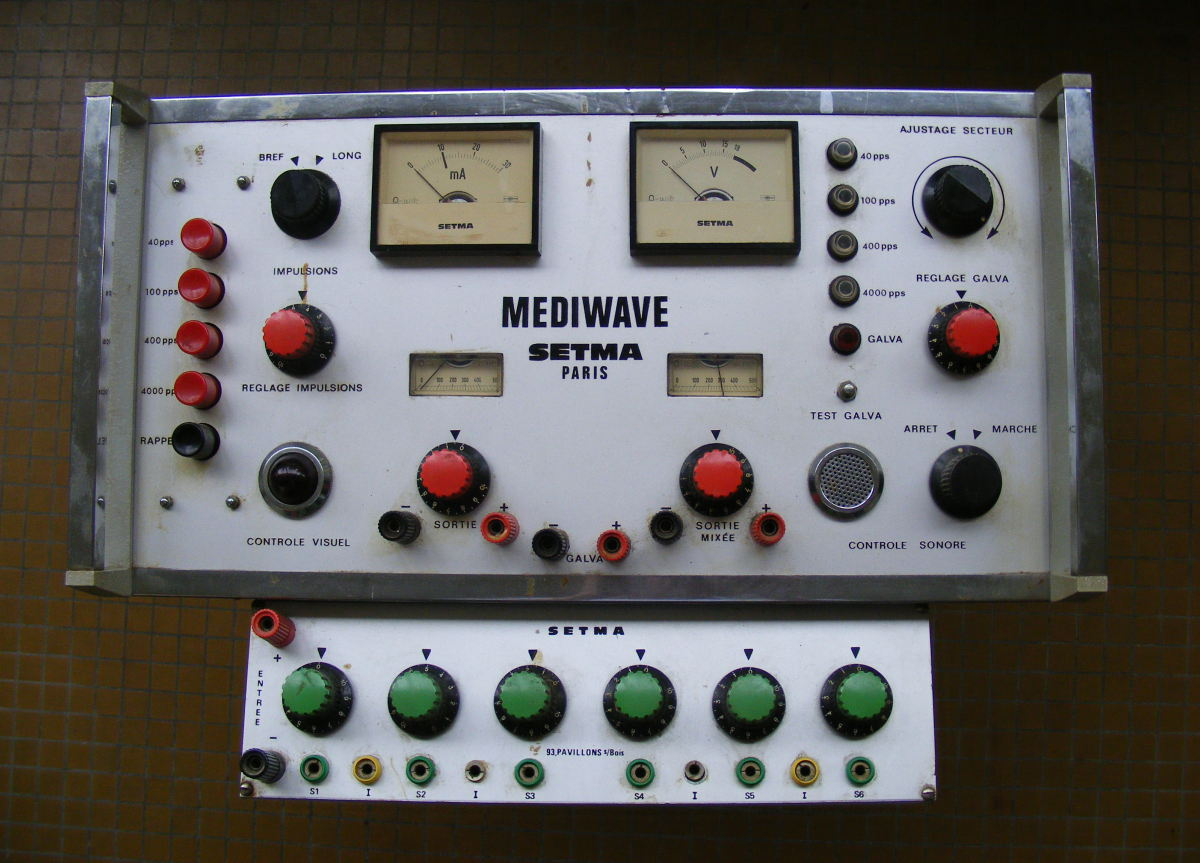 Appareil d'électrothérapie utilisé dans le cadre de la kinésithérapie. Détail de la face avant.